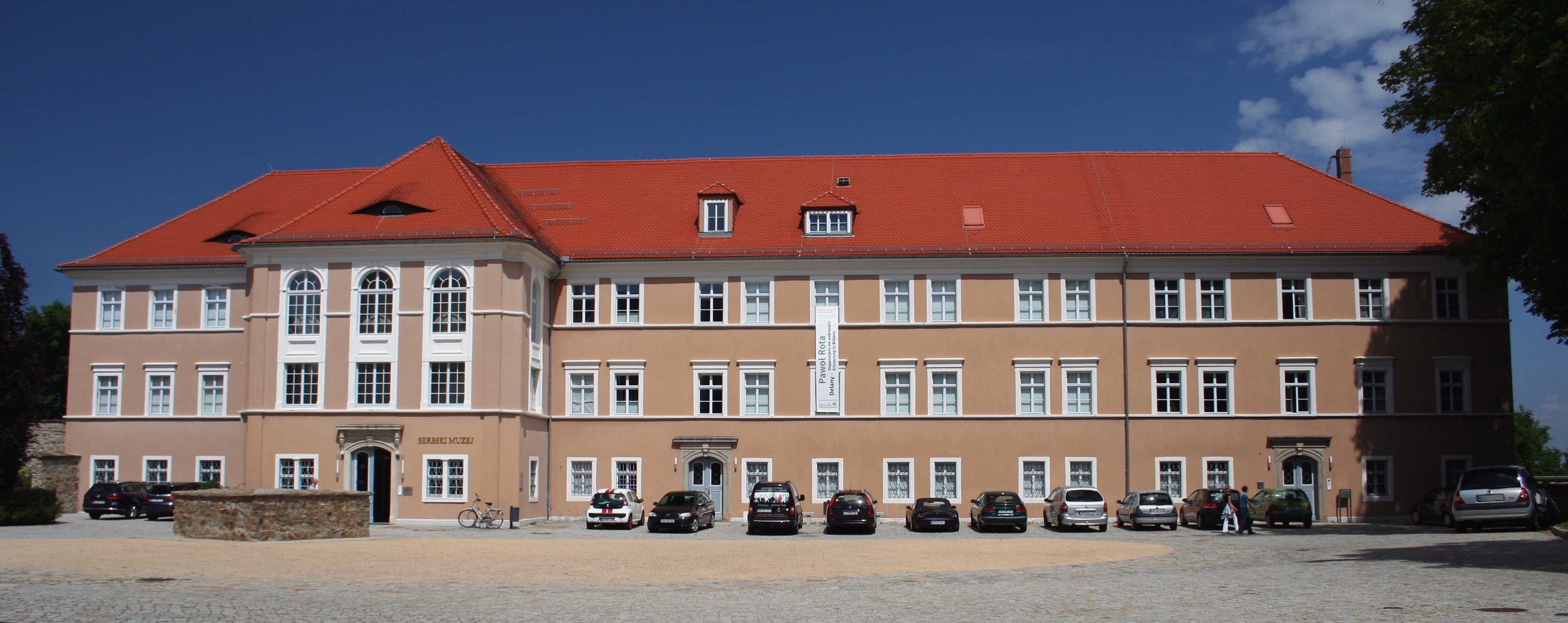 Sorbisches Museum, Bautzen